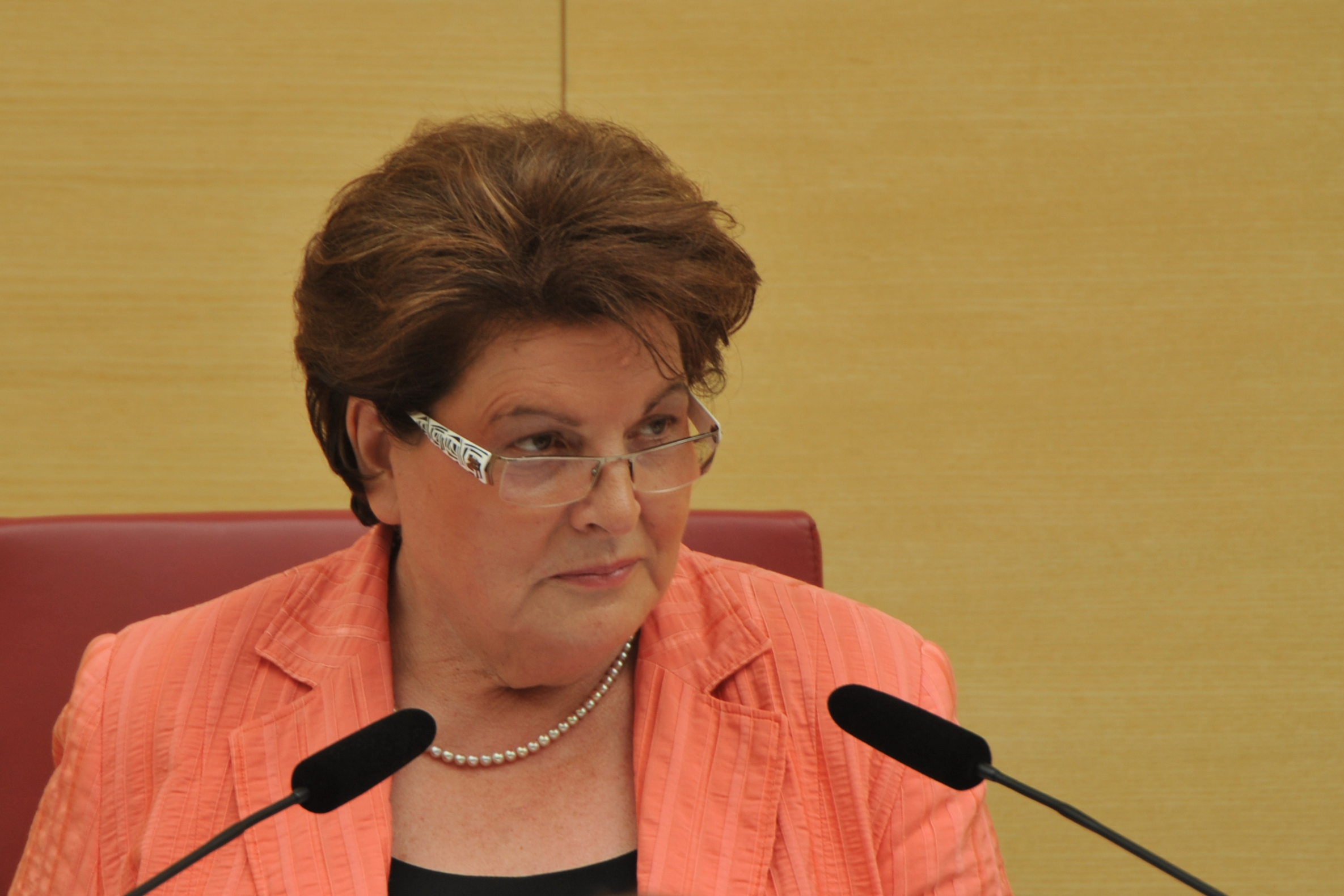 Landtagsprojekt Bayern The making of this work was supported by Wikimedia Austria. For other files made with the support of Wikimedia Austria, please see the category Supported by Wikimedia Österreich. Wikipedia im Landtag – Bayern 17. bis 19. Juli 2012 in MünchenDieses Foto wurde im Rahmen des Projektes „Wikipedia im Landtag“ erstellt.